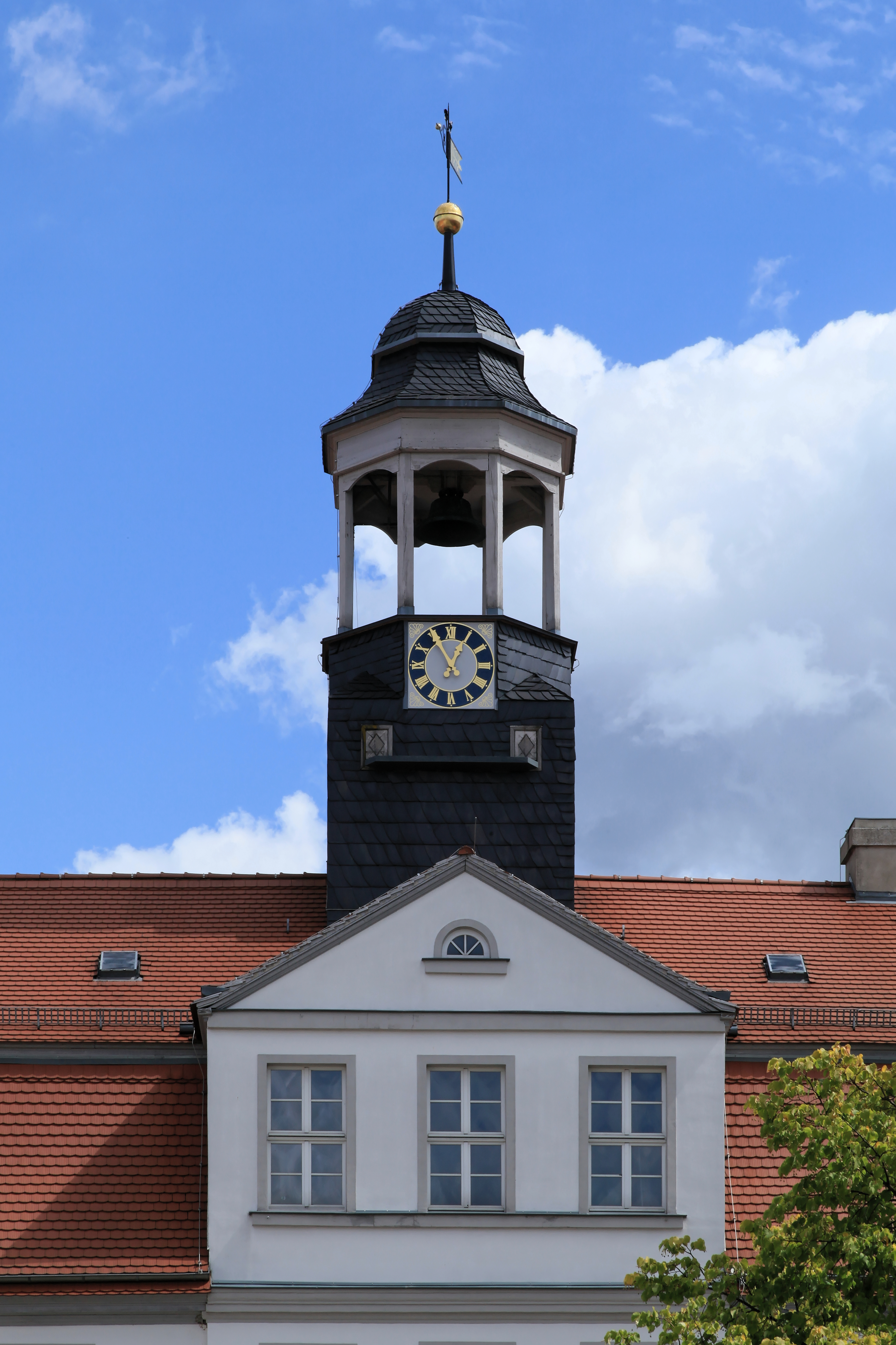 Rathaus, Markt in Bad Düben)